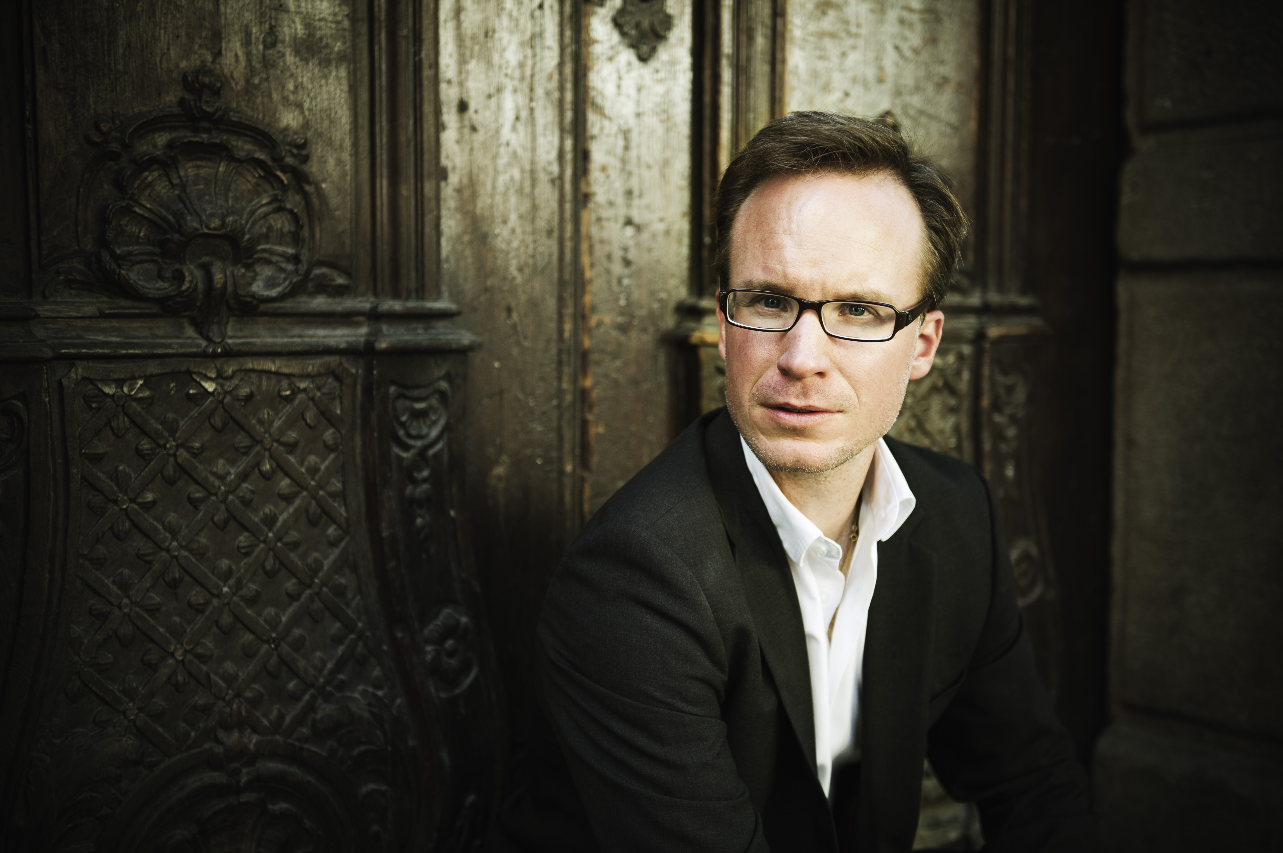 Porträttbild av Claes Ericson.